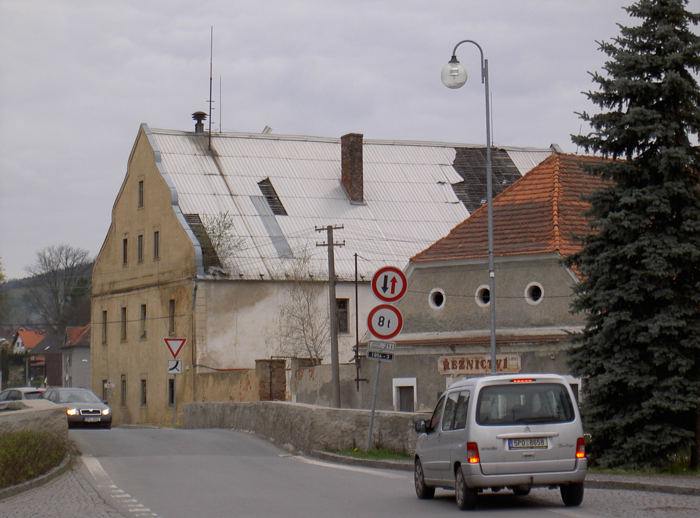 Bělá nad Radbuzou